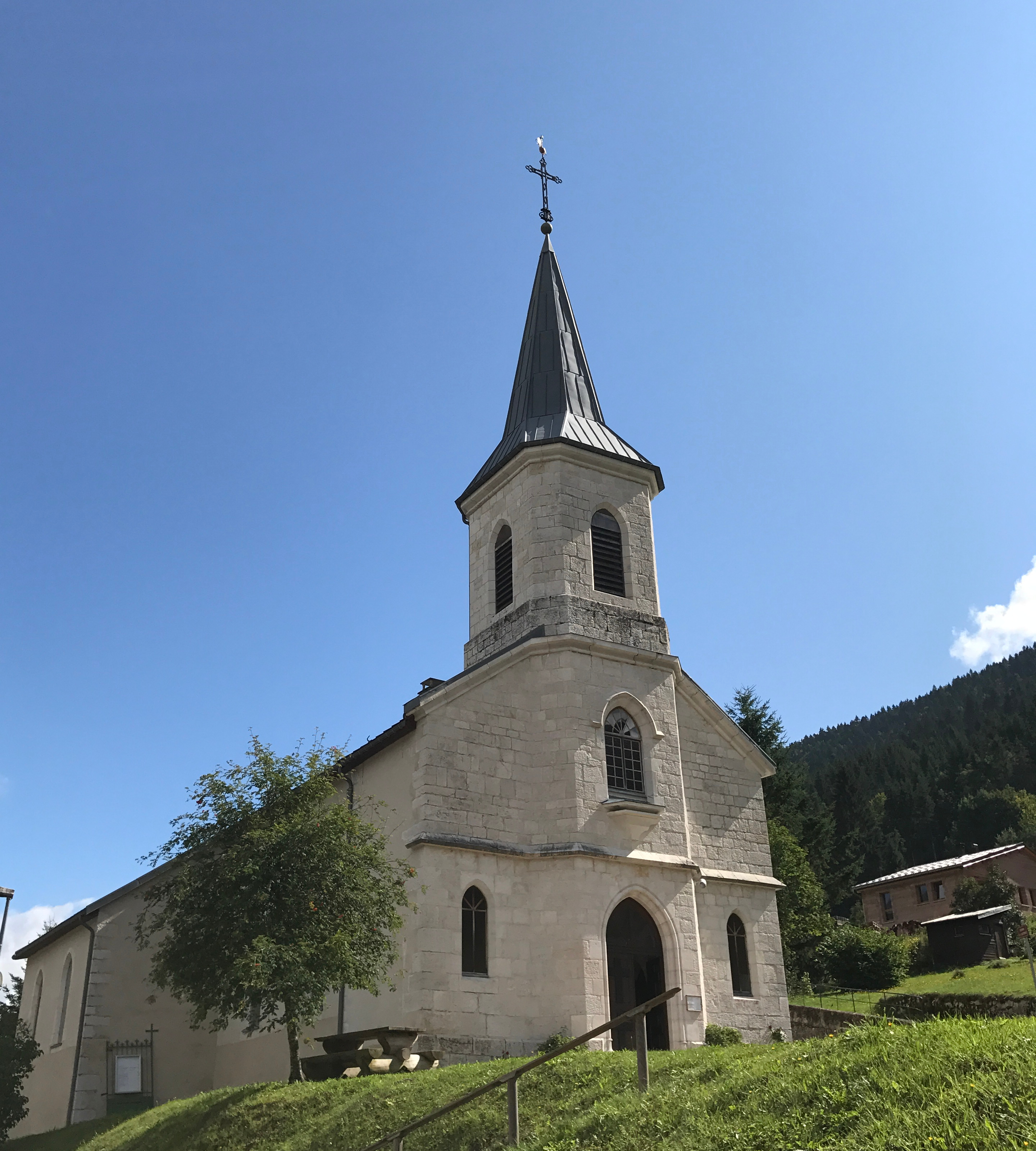 Tour de l'Ain 2017 - étape 4 - Lélex.